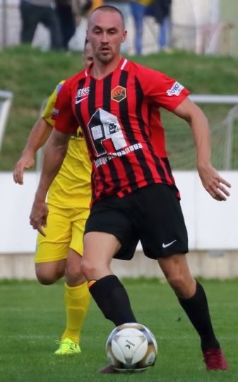 Nikola Frljuzec im Dress des 1. Simmeringer SC